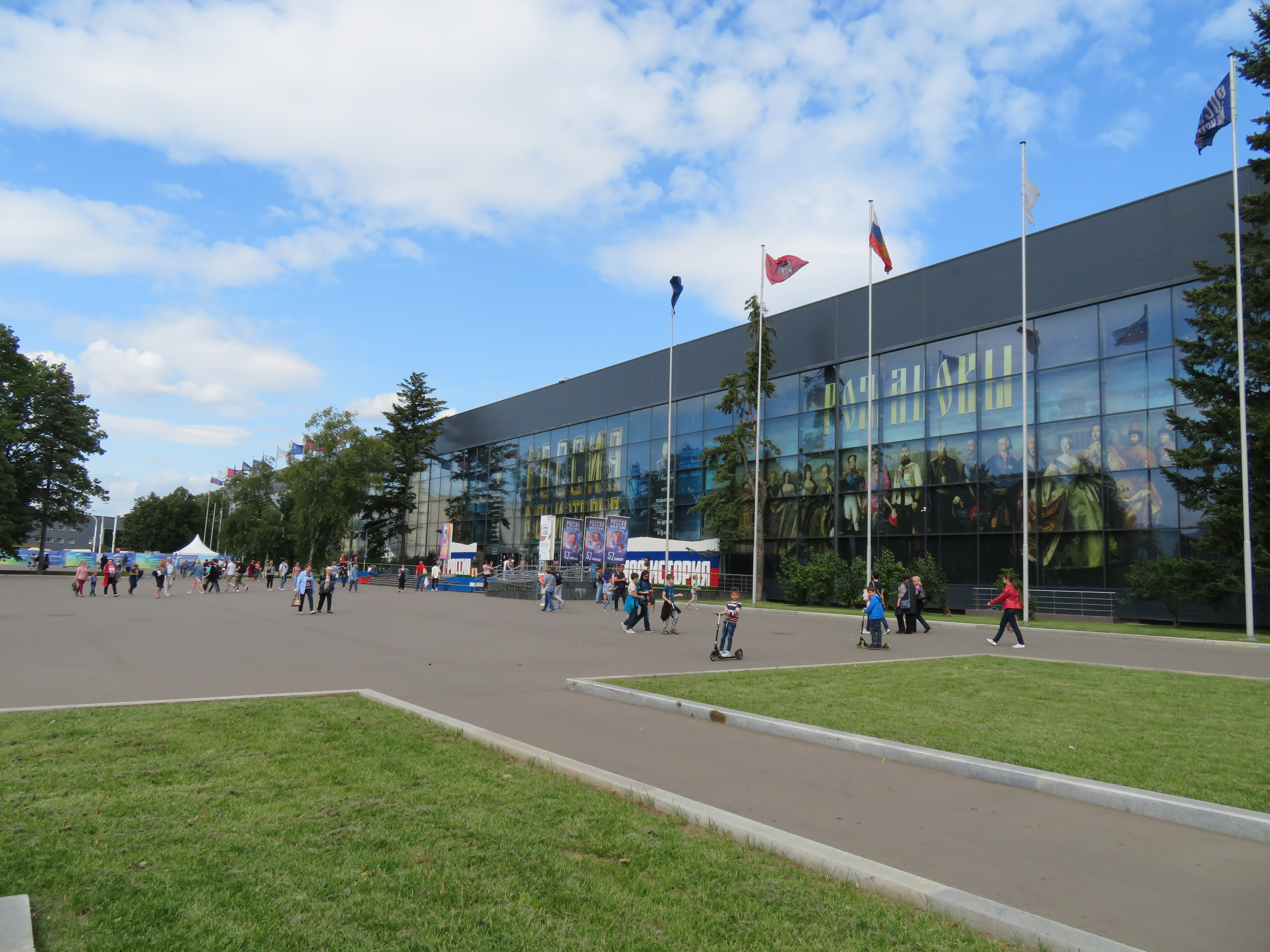 Павильон №57 ВНДХ в Москве, выставка «Россия — моя история».